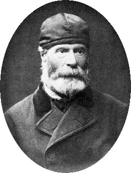 Hjalmar F Ling, Gymnastiklärare